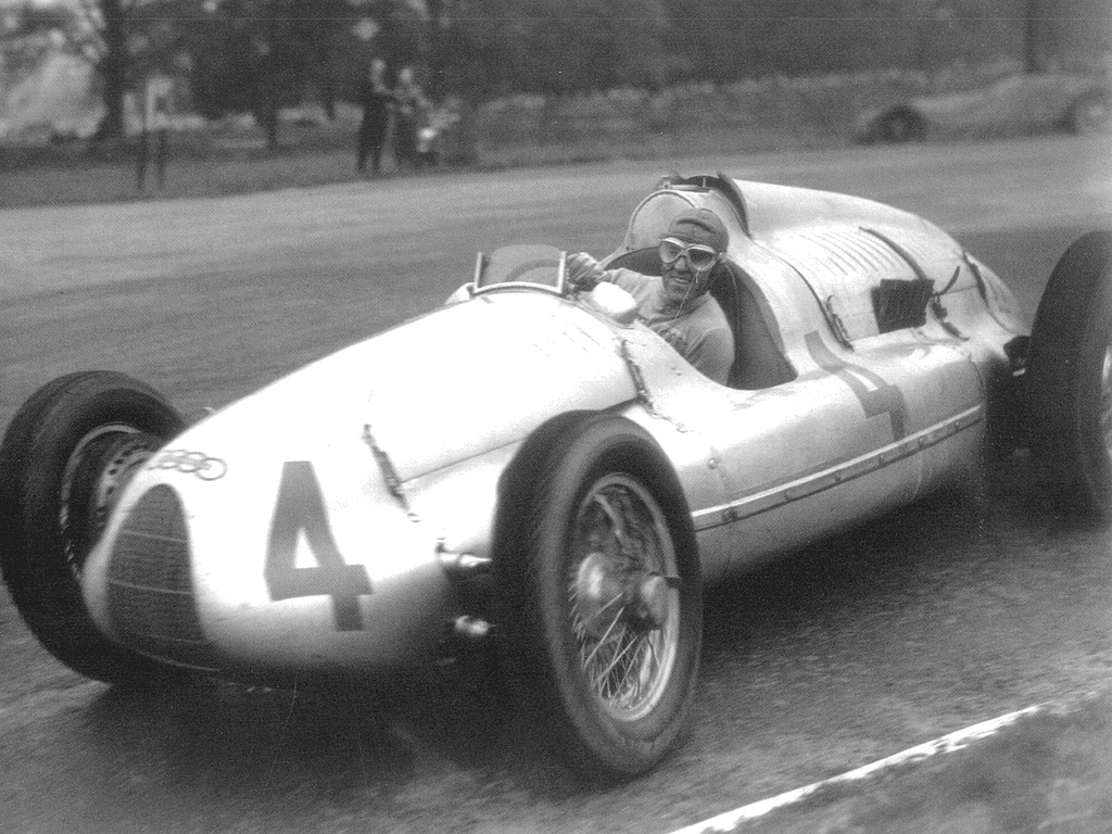 Preteča formule 1 na Kalemegdanu - Međunarodne automobilske i motociklističke trke održane 3. septembra 1939.